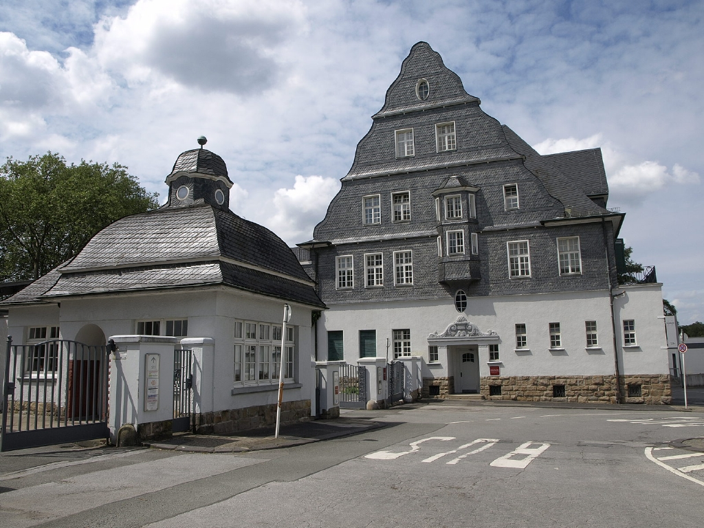 ehemal. Restaurant-Hotel „Zur Börse" Viehhofstraße 125 Wuppertal Denkmalnr. 1445. 1913-1915 errichtet. 1972 geschlossen. Ab 1974 Kultur- und Kommunikationszentrum „Die Börse". 1977 durch Brand schwer beschädigt. 1980 Wiedereröffnung. Seit 1997 in Privatbesitz als „VillaMedia 1". Links das Pförtnerhaus.This is a photograph of an architectural monument. 1445